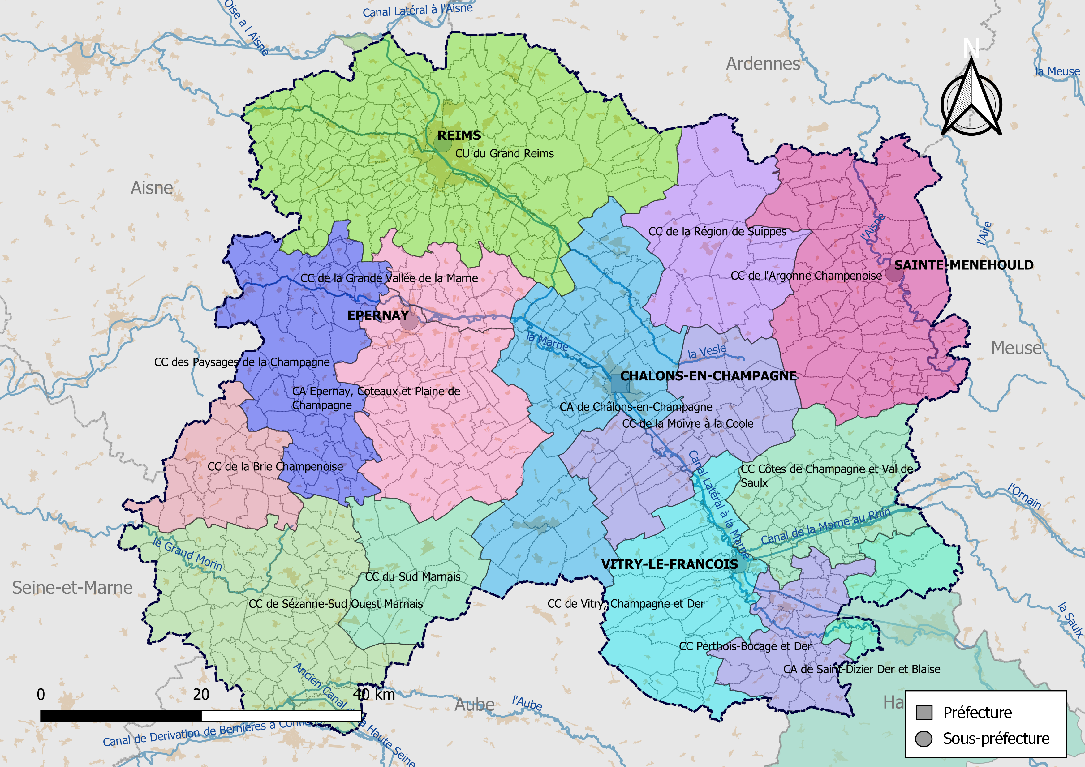 Carte des intercommunalités du département de la Marne, France. Composition au 1er janvier 2019.